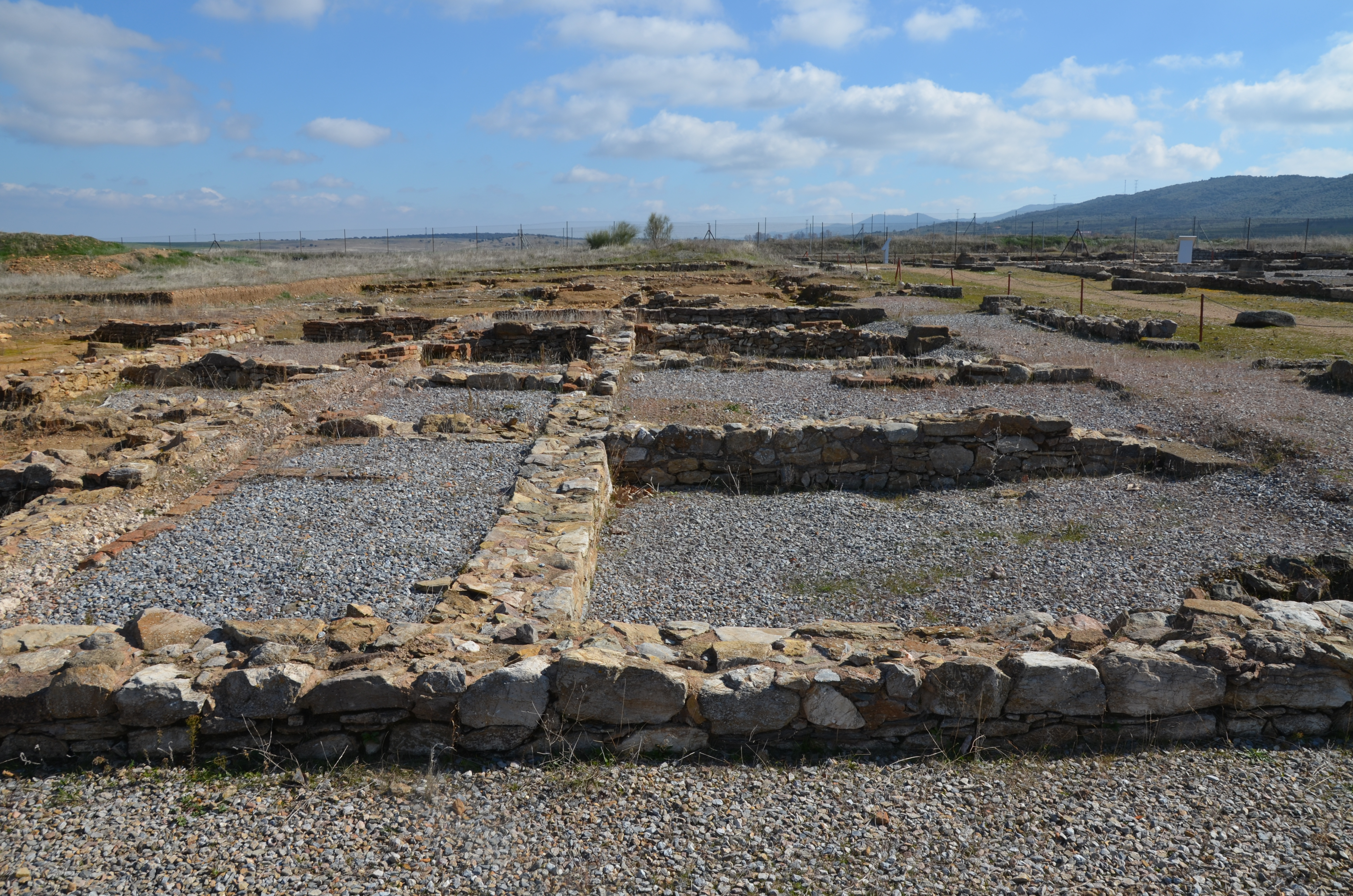 Regina Turdulorum, Extremadura, Spain